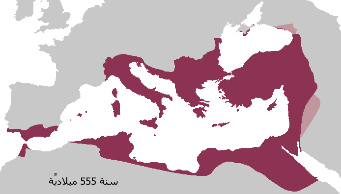 الإمبراطوريَّة الرومانيَّة الشرقيَّة (البيزنطيَّة) بالنفسجي، والممالك والإمارات التابعة لها (بالوردي)، سنة 555 ميلاديَّة خلال عهد القيصر جُستنيان الأوَّل. وهذه الدُول هي: مملكة لازيكا، وإمارة أبخازيا (في الأعلى)، ومملكة الغساسنة (شرقًا).